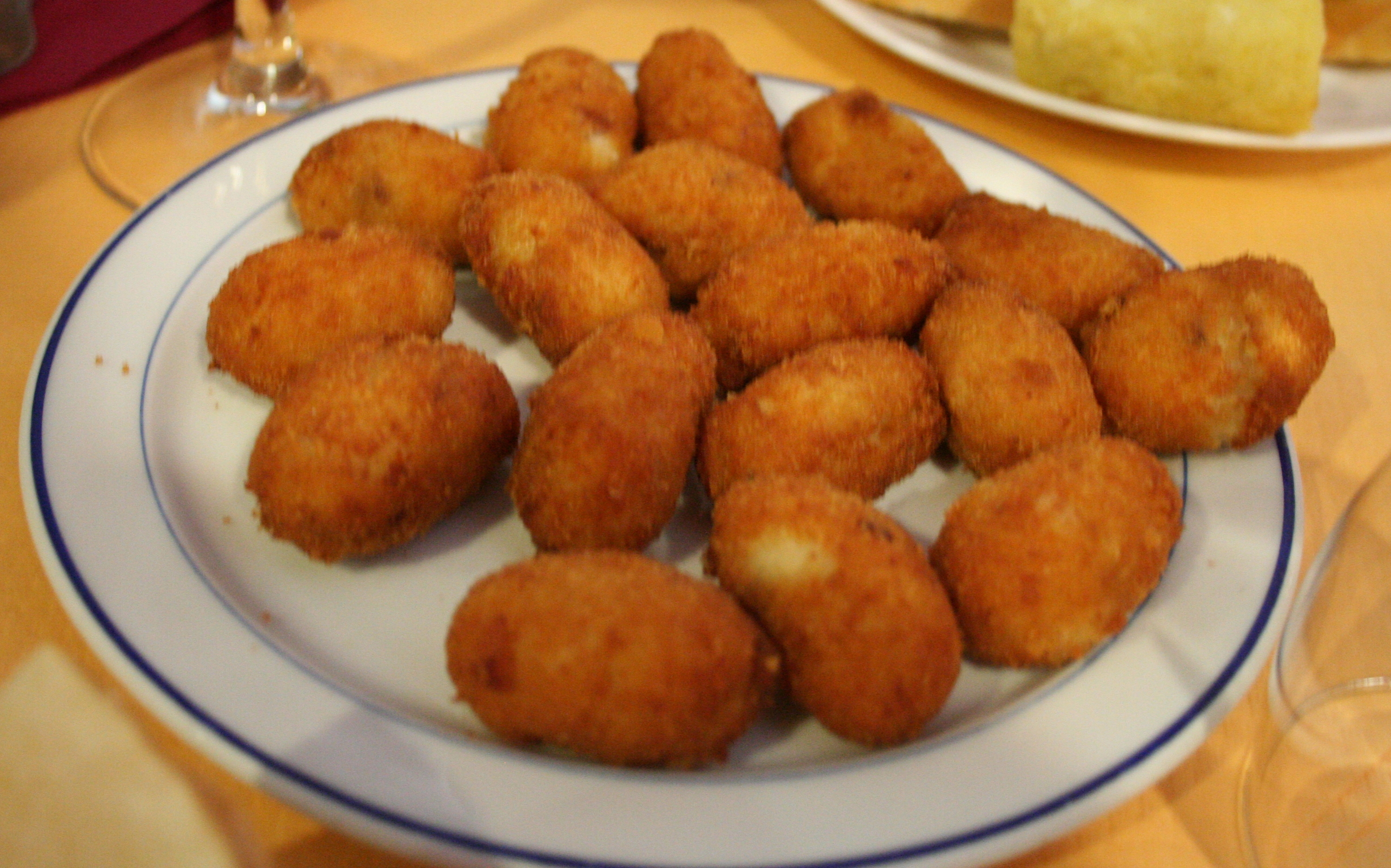 Comida Astromartos 2009